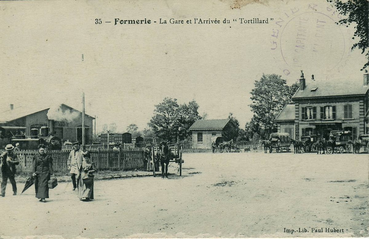 Carte postale de la gare vers 1910.